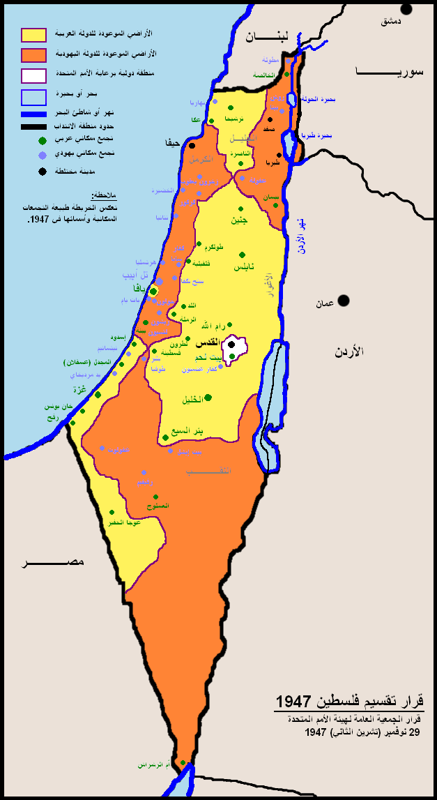 الدولة اليهودية الدولة العربية منطقة دولية بإدارة الأمم المتحدة